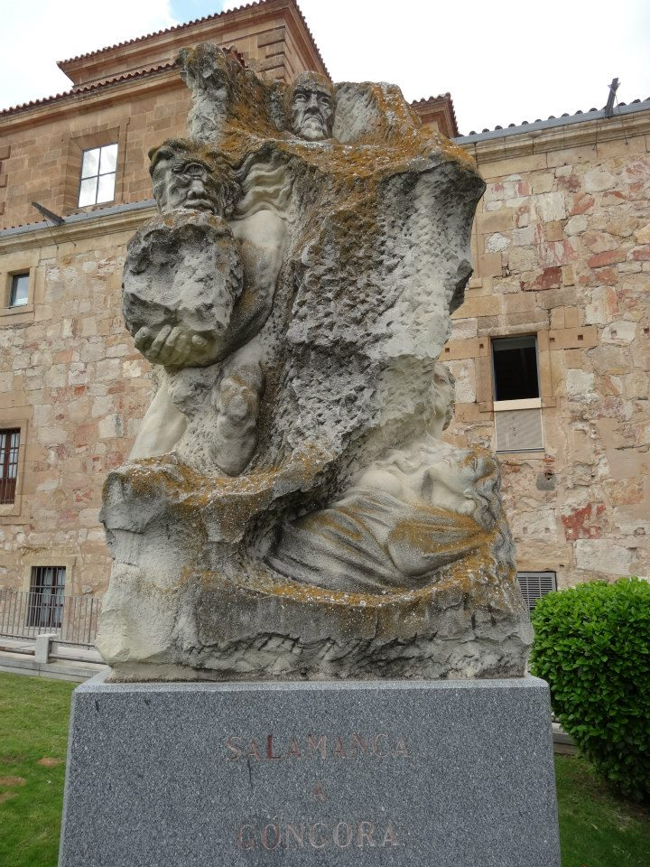 Monumento a Góngora en Salamanca, ciudad en cuya universidad estudió. Escultura de Severiano Grande